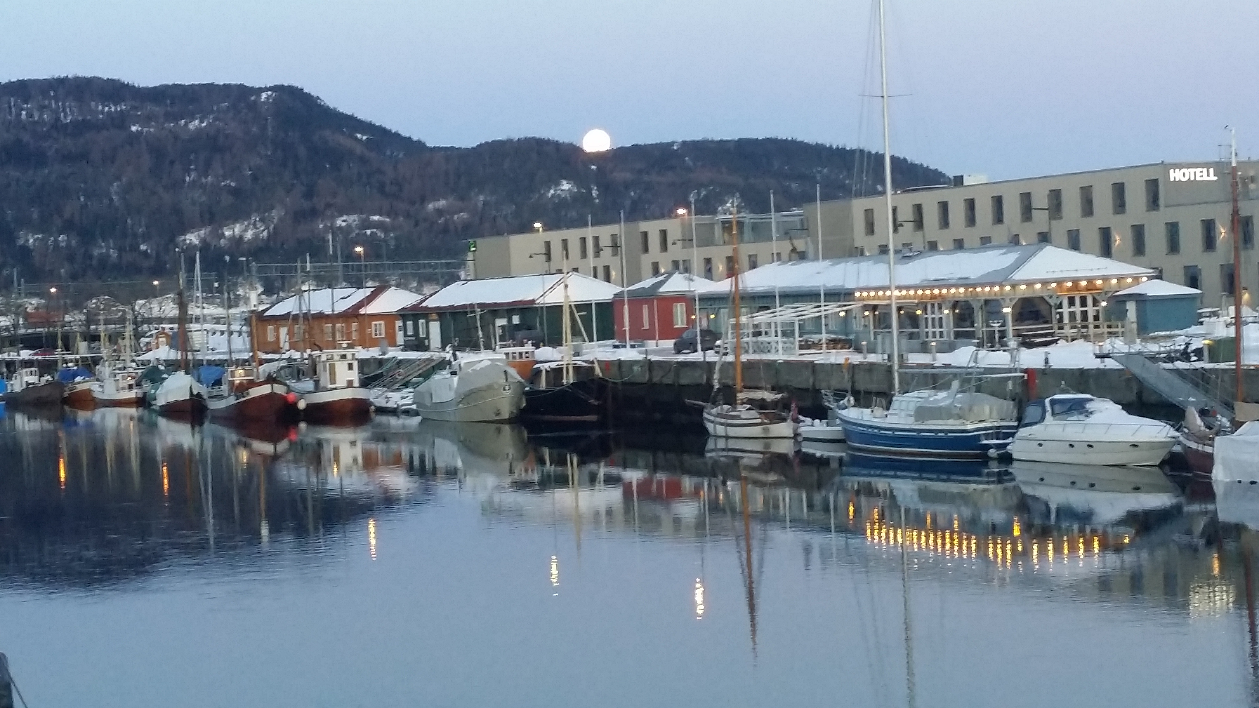 Brattøra en vintermorgen.